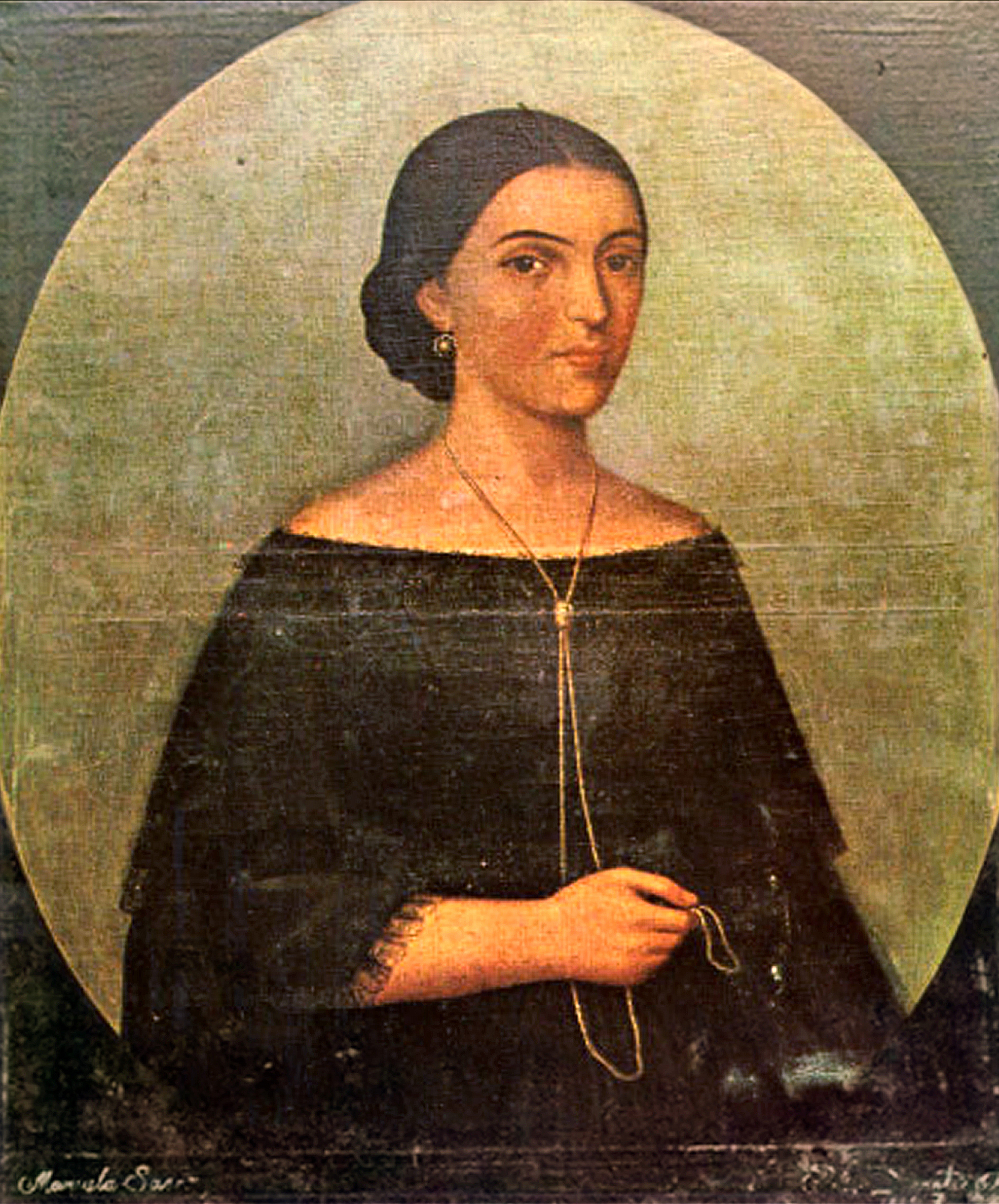 Retrato de Manuela Sáenz en 1825 por Pedro Durante - Lima (Perú)